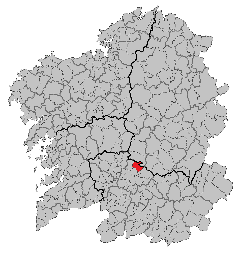 Mapa coa localización do concello de A Peroxa.